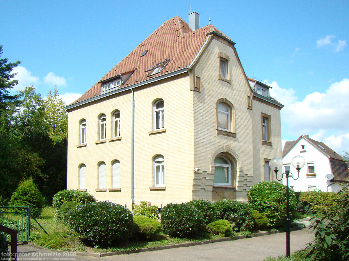 Denkmalgeschütztes katholisches Pfarrhaus, Ludwigsburger Straße 66 in Heilbronn-Böckingen